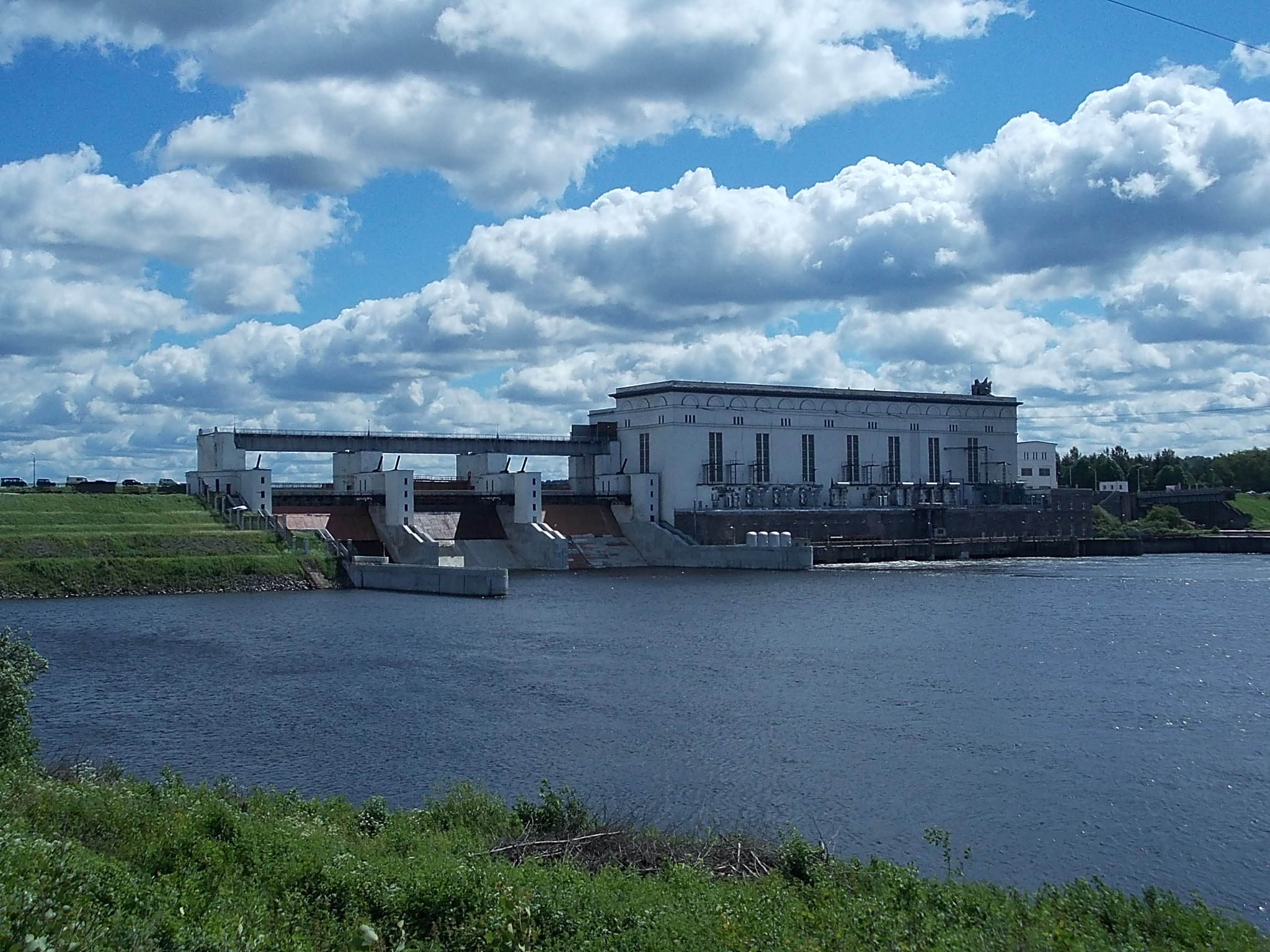 Верхнесвирская ГЭС